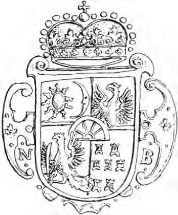 Stemă monetară a lui George Rakoczy I, 1643